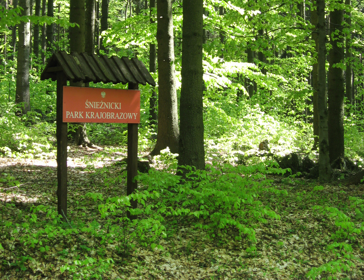 Tablica Śnieżnickiego Parku Krajobrazowego na Przełęczy Jaworowej w Górach Złotych (Sudety Południowo-Wschodnie)